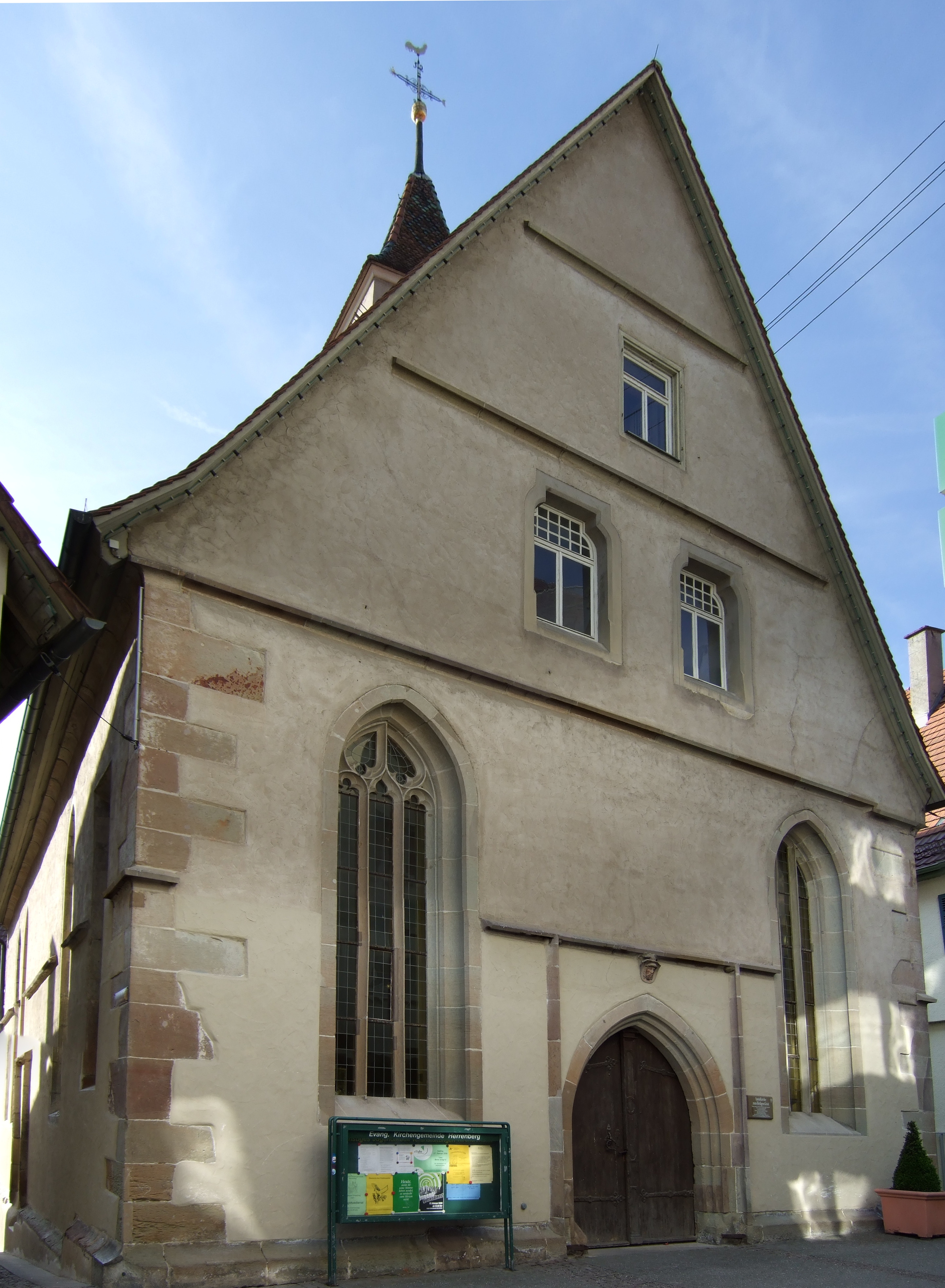 Herrenberg: Spitalkirche zum Heiligen Geist; mit dem Spital um 1400 durch Stiftung der Bürger entstanden; 1412 Stiftung eines ewigen Lichtes; 1466 und 1635 ausgebrannt, danach jeweils wieder ausgebaut (1655/56); 1656 Holzkanzel mit Intarsien; 1945 durch Bomben beschädigt; 1947/48 repariert und mit weiterem Fenser in der Südwand und neuer Altarwand von Professor Yelin versehen.